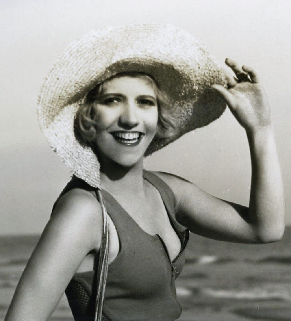 Laura Lee